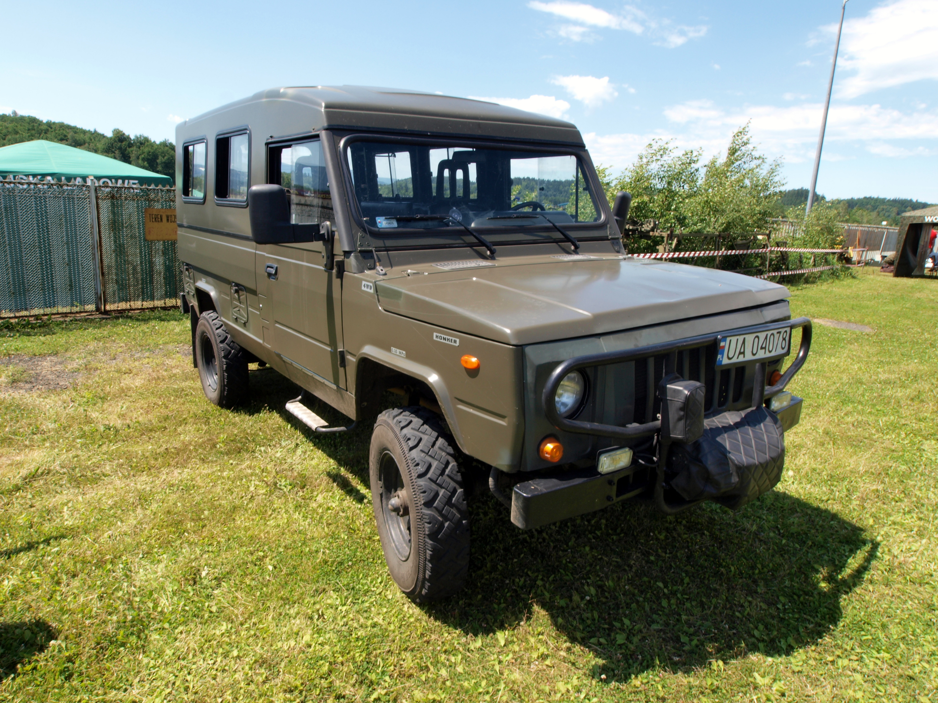 Daewoo/Intrall Honker 2000